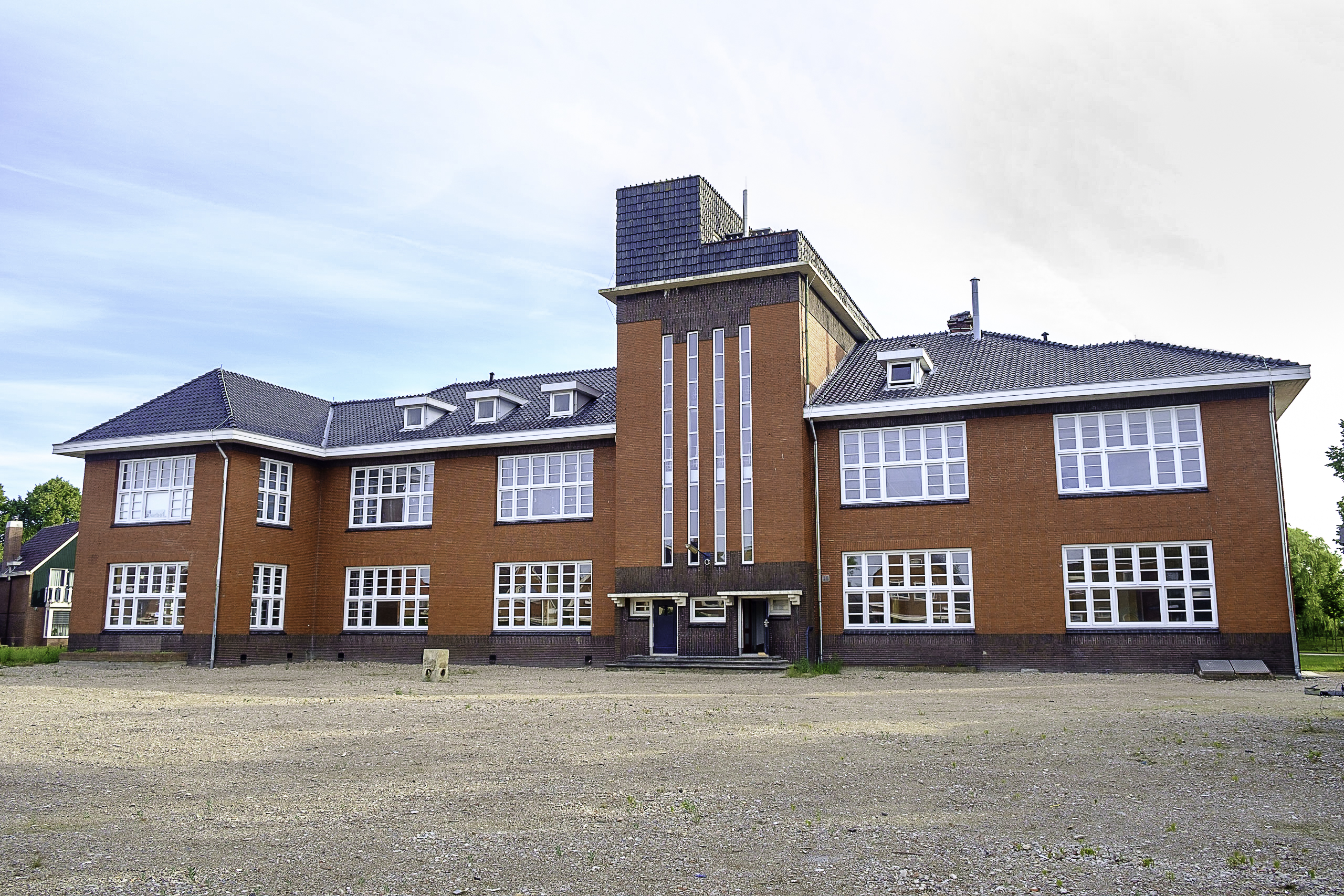 Vooraanzicht van de voormalige Zeevaartschool Abel Tasman aan het Abel Tasmanplein 4 in Delfzijl